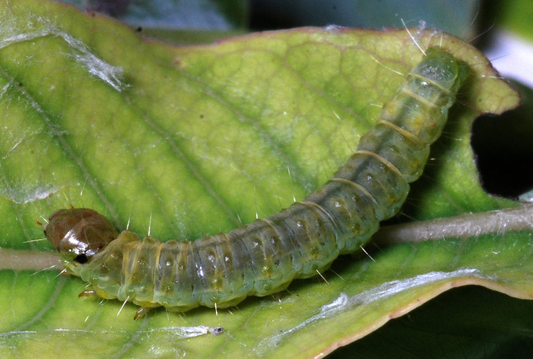 Cacoecimorpha pronubana larva